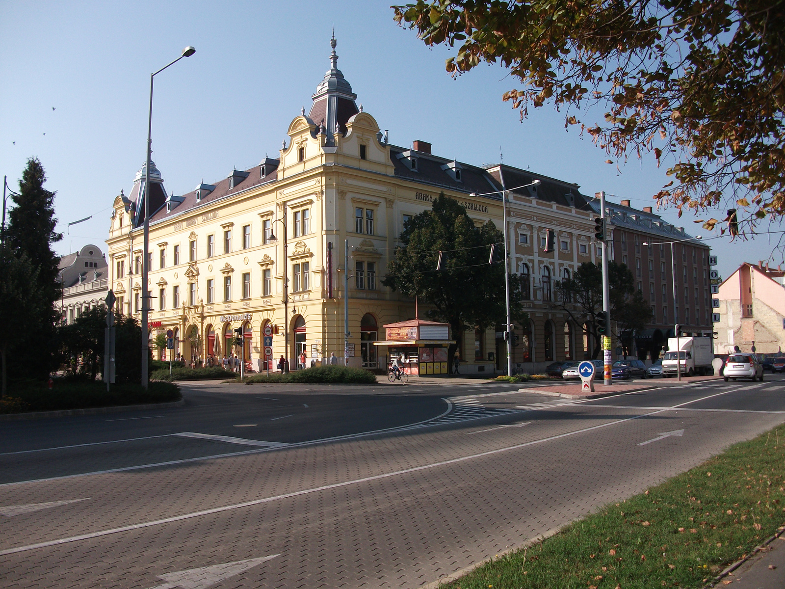 Arany Bárány Szálló (Zalaegerszeg, Széchenyi tér 1.) This is a photo of a monument in Hungary. Identifier: 11069